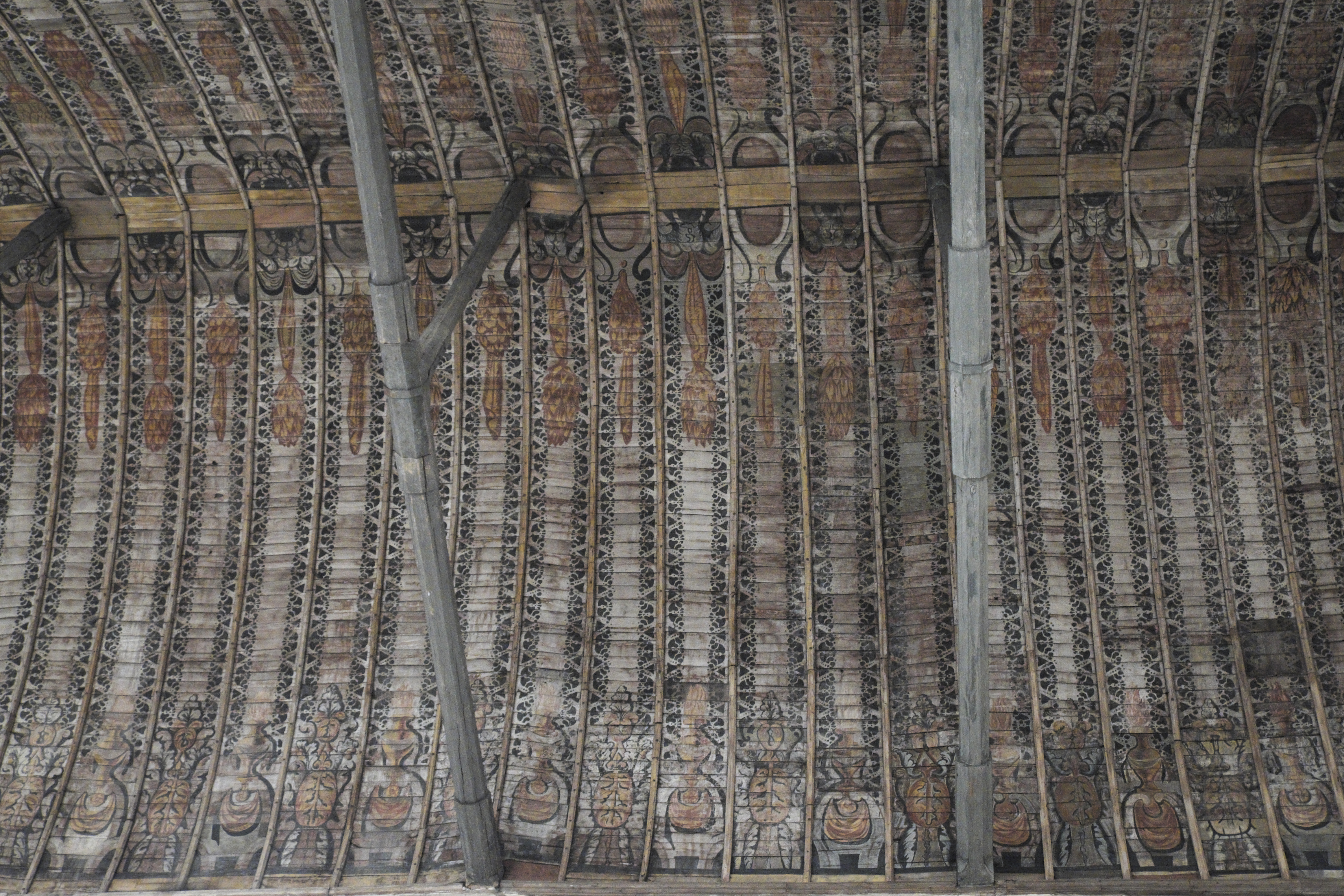 Katholische Kirche Saint-Pierre in Épernon im Département Eure-et-Loir (Centre-Val de Loire/Frankreich), bemalte Holzdecke aus dem 16. Jahrhundert .